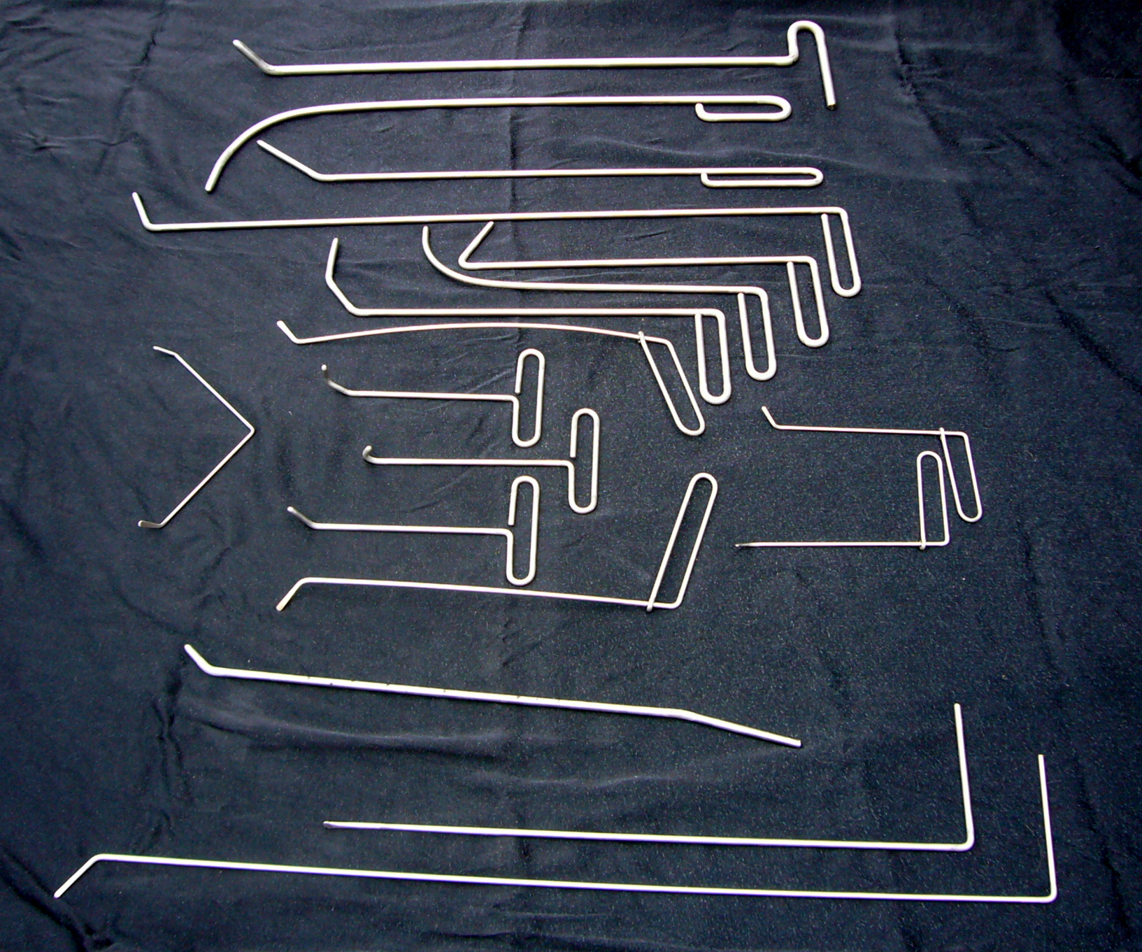 Verschiedene Ausbeulhebel